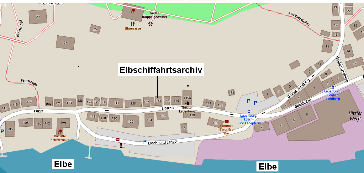 Lauenburg Elbschiffahrtsarchiv